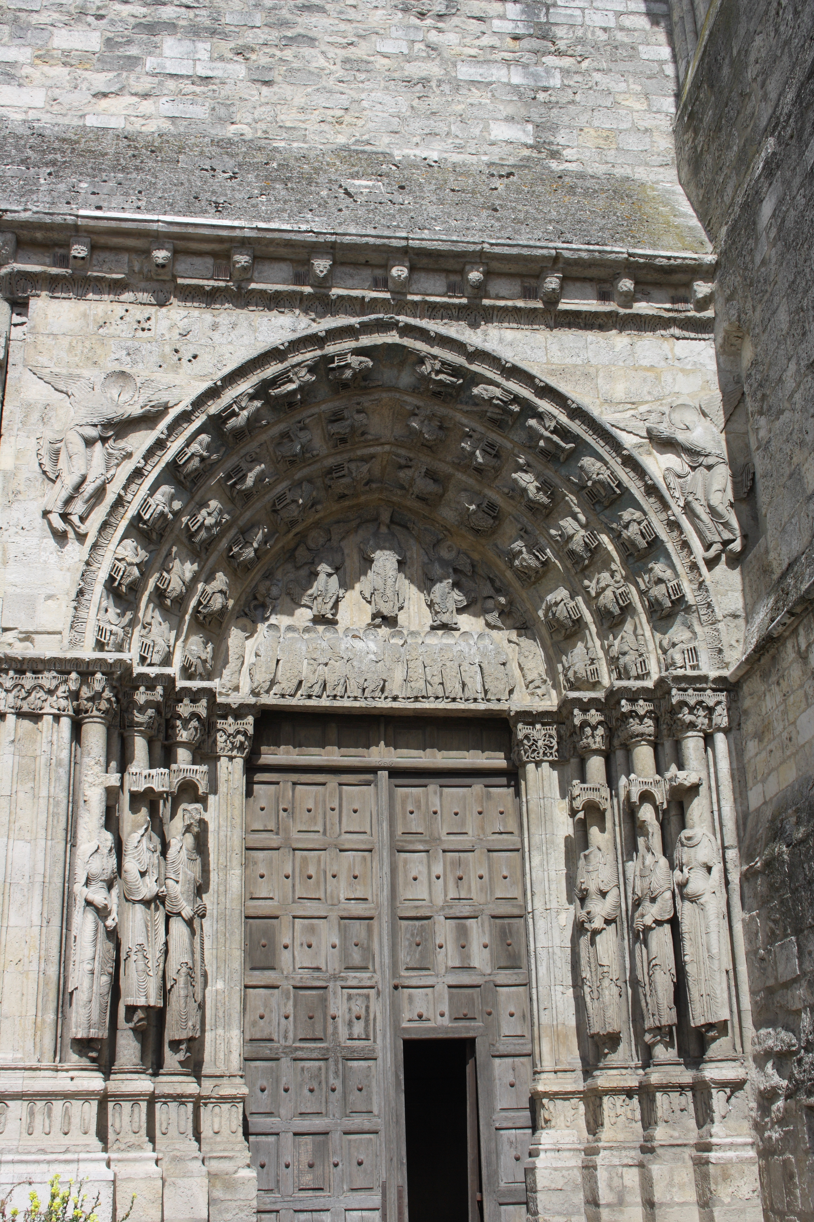 Katholische Pfarrkirche Notre-Dame-du-Fort in Étampes im Département Essonne in der Region Île-de-France (Frankreich), Südportal um 1150 Object location48° 26′ 05.89″ N, 2° 09′ 51.01″ E